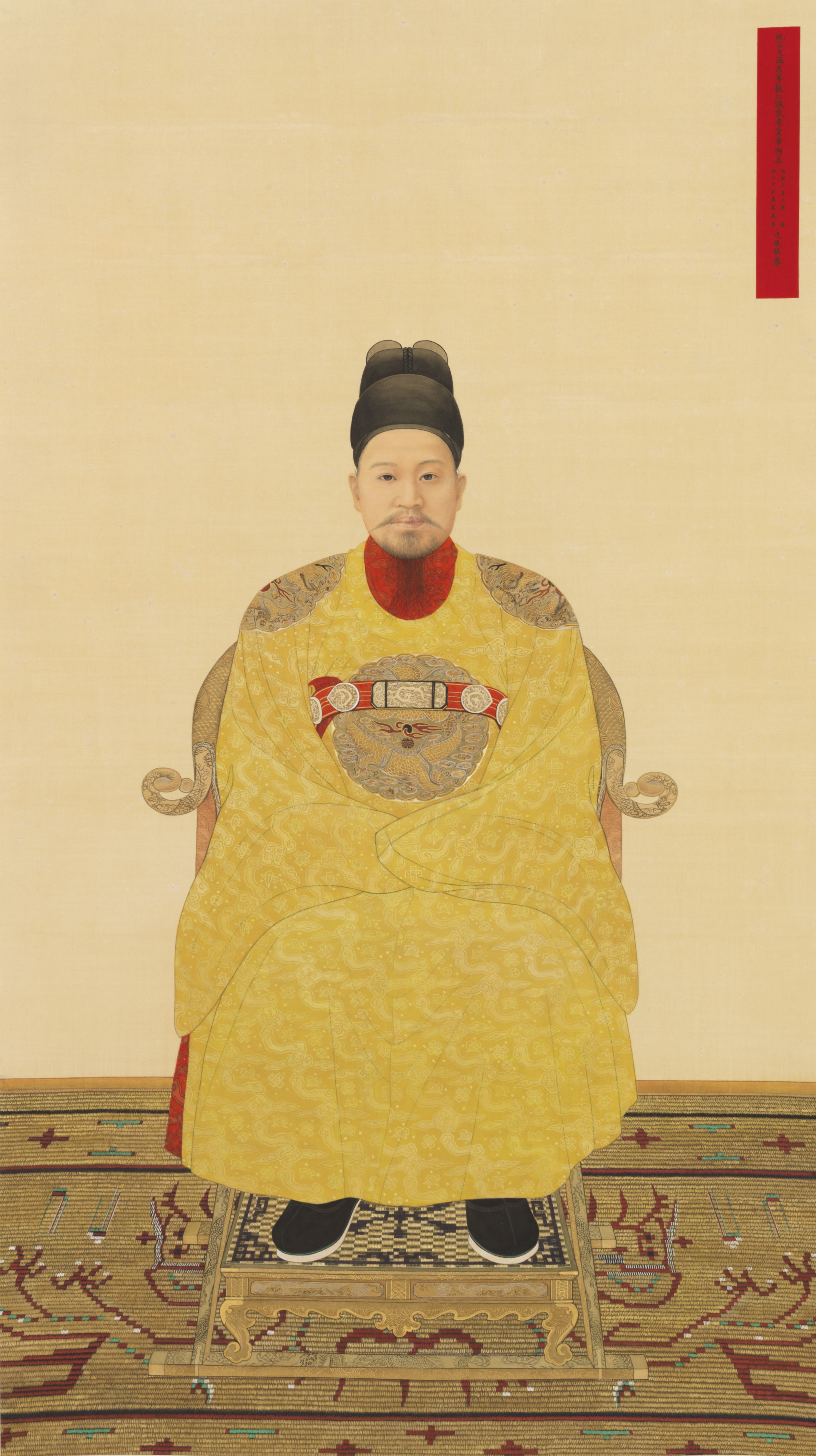 복원품 순종 어진 복원모사도 1928년 이당 김은호의 순종어진을 2014년에 복원하여 제작한 모사도